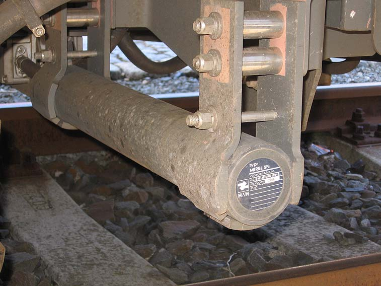 Snímač vlakového zabezpečovače Mirel na lokomotivě 1216.050